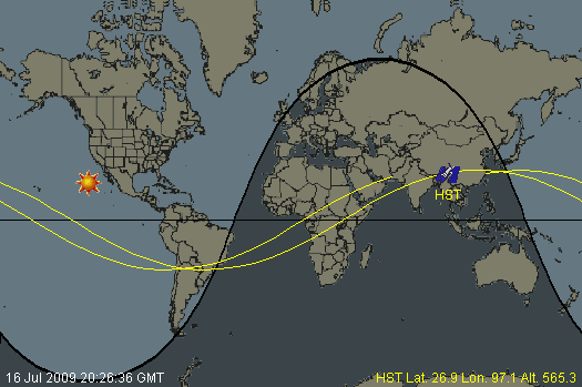 Trace au sol du satellite artificiel Hubble.